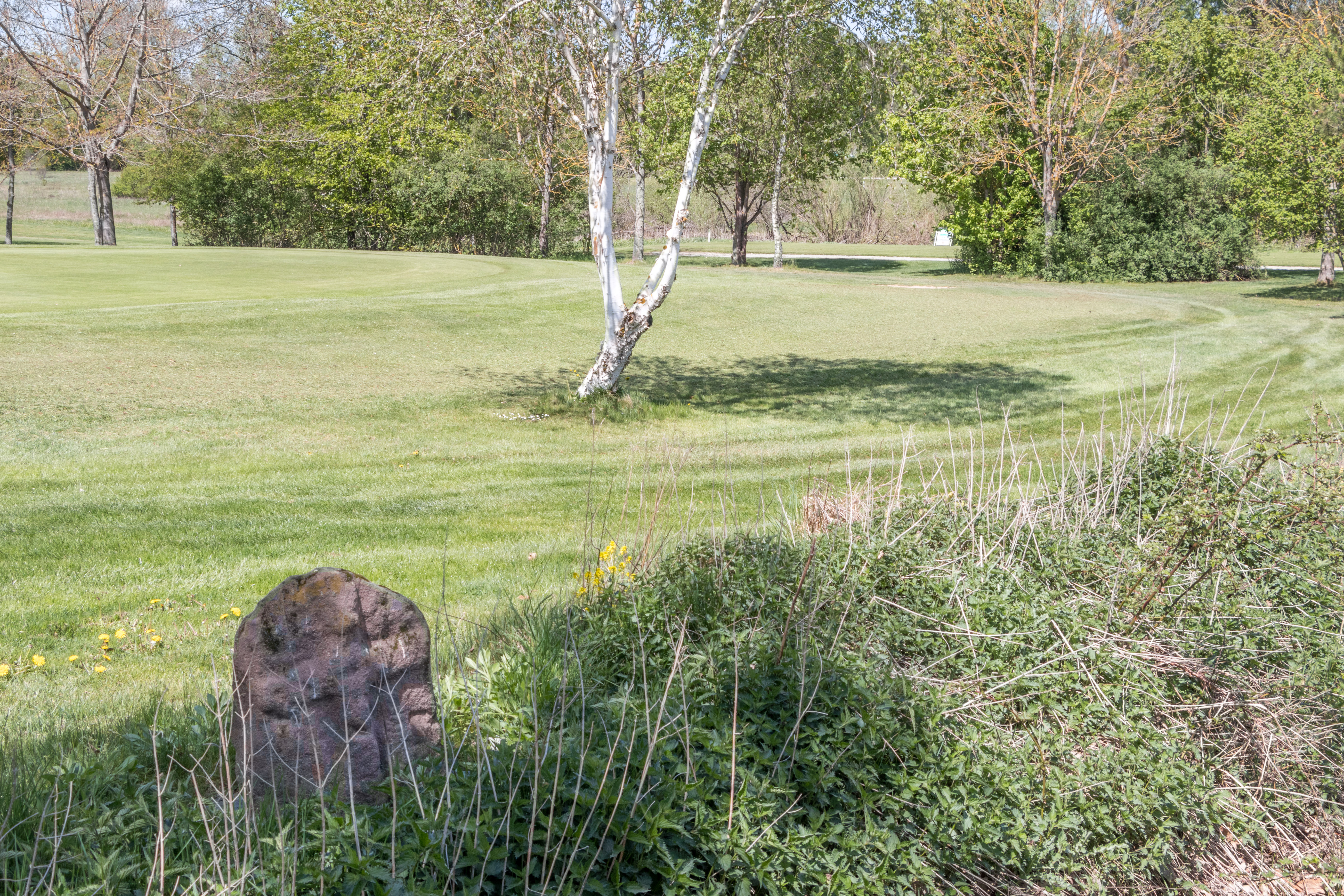 Kreuzstein, Abenberg, Baudenkmal, Golfplatz, Standort